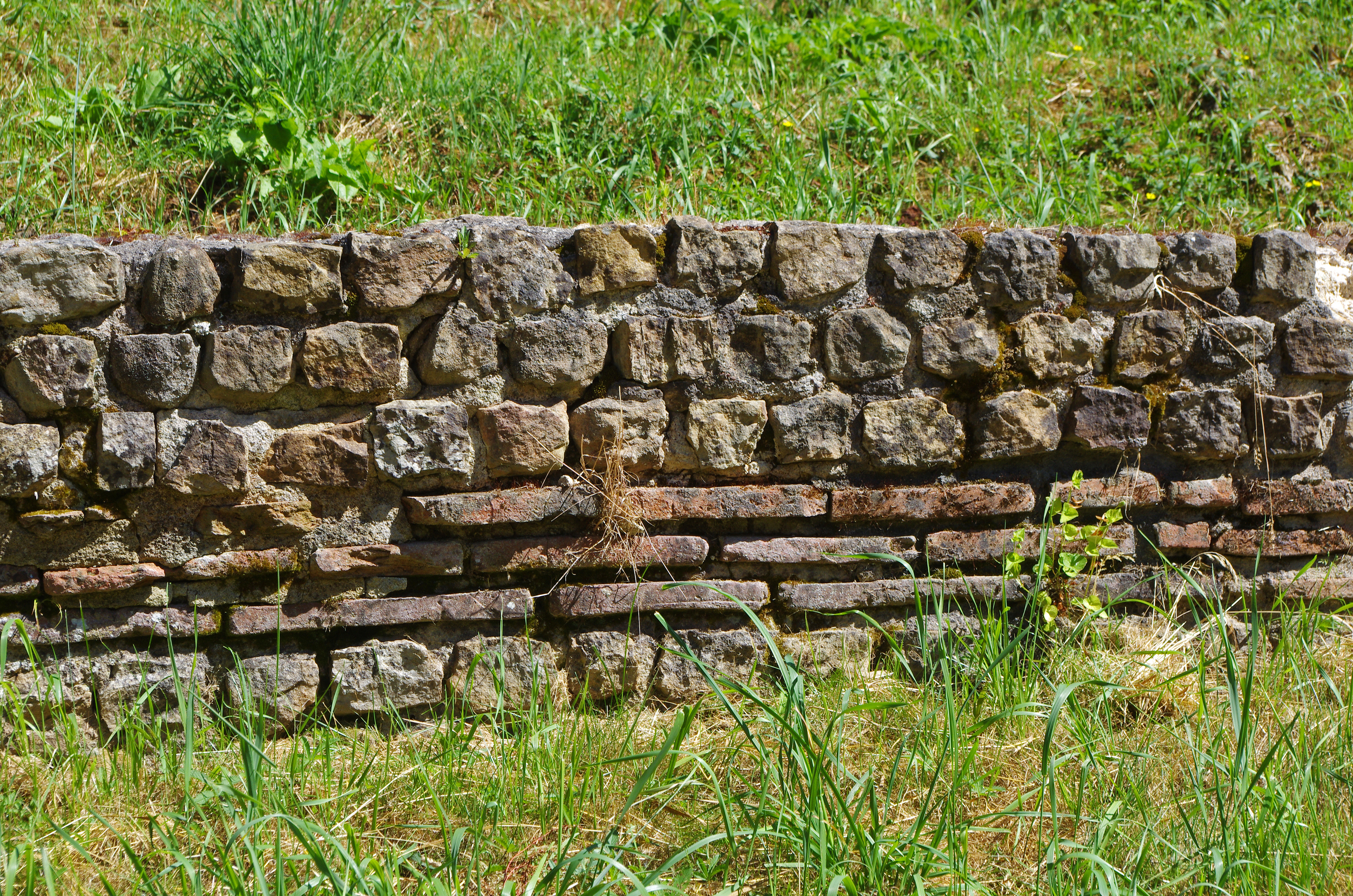 Amphithéâtre Gallo-Romain de Gennes (Maine-et-Loire). Mur en "opus mixtum" (appareil mélangé). L'opus mixtum alterne dans un mur de lits de moellons de pierres (opus vittatum) et de lits de briques (opus testaceum). Amphitheatre Gallo-Romain of Gennes (Maine-et-Loire). Wall "opus mixtum" (mixed system). Opus mixtum alternates in a wall beds rubble stones (opus vittatum) and beds of bricks (opus testaceum).